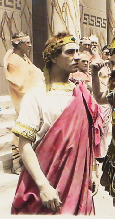 Scena del film Damon and Pythias del 1914. Immagine originale di dominio pubblico.